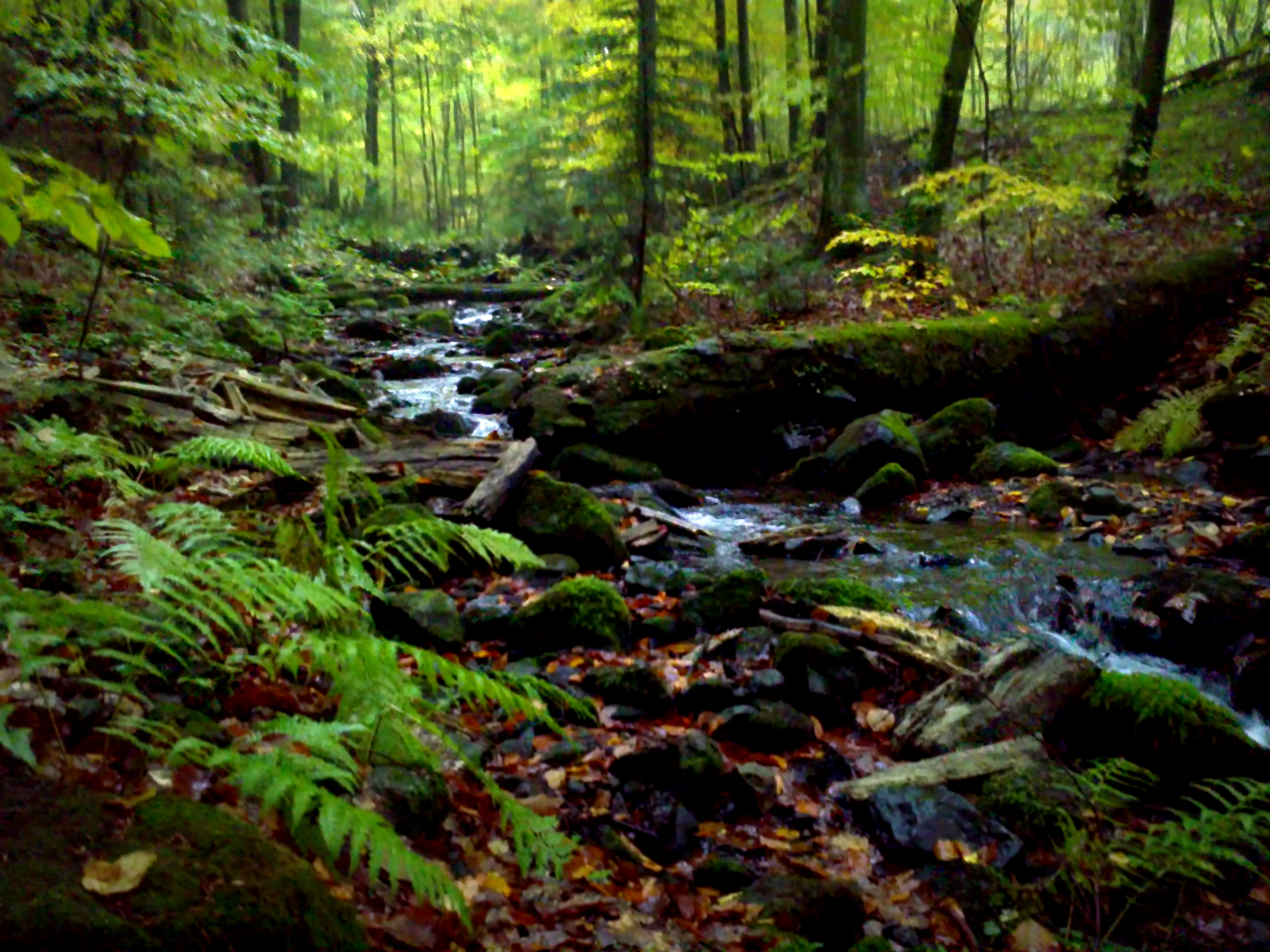 Pohľad na Badínsky potok.